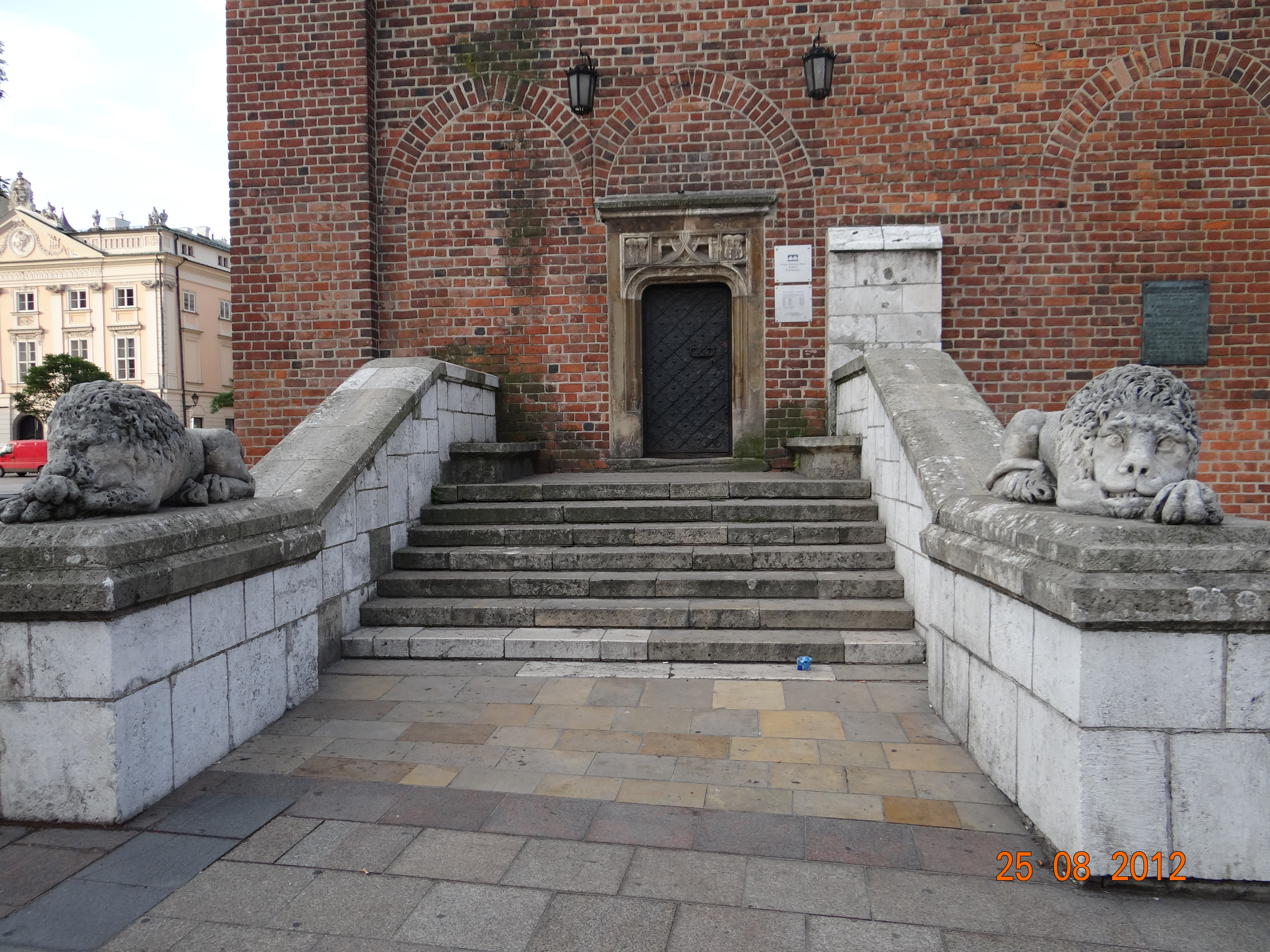 wieża ratuszowa Kraków, Rynek Główny, Kraków